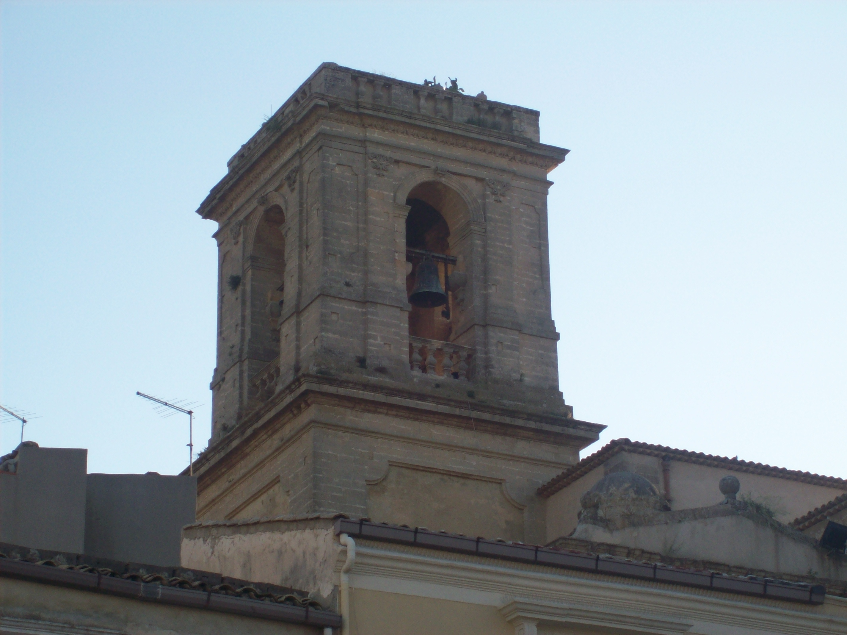 Panorama di Licodia Eubea con il campanile della chiesa madre , foto di Gregorio Giarrusso.